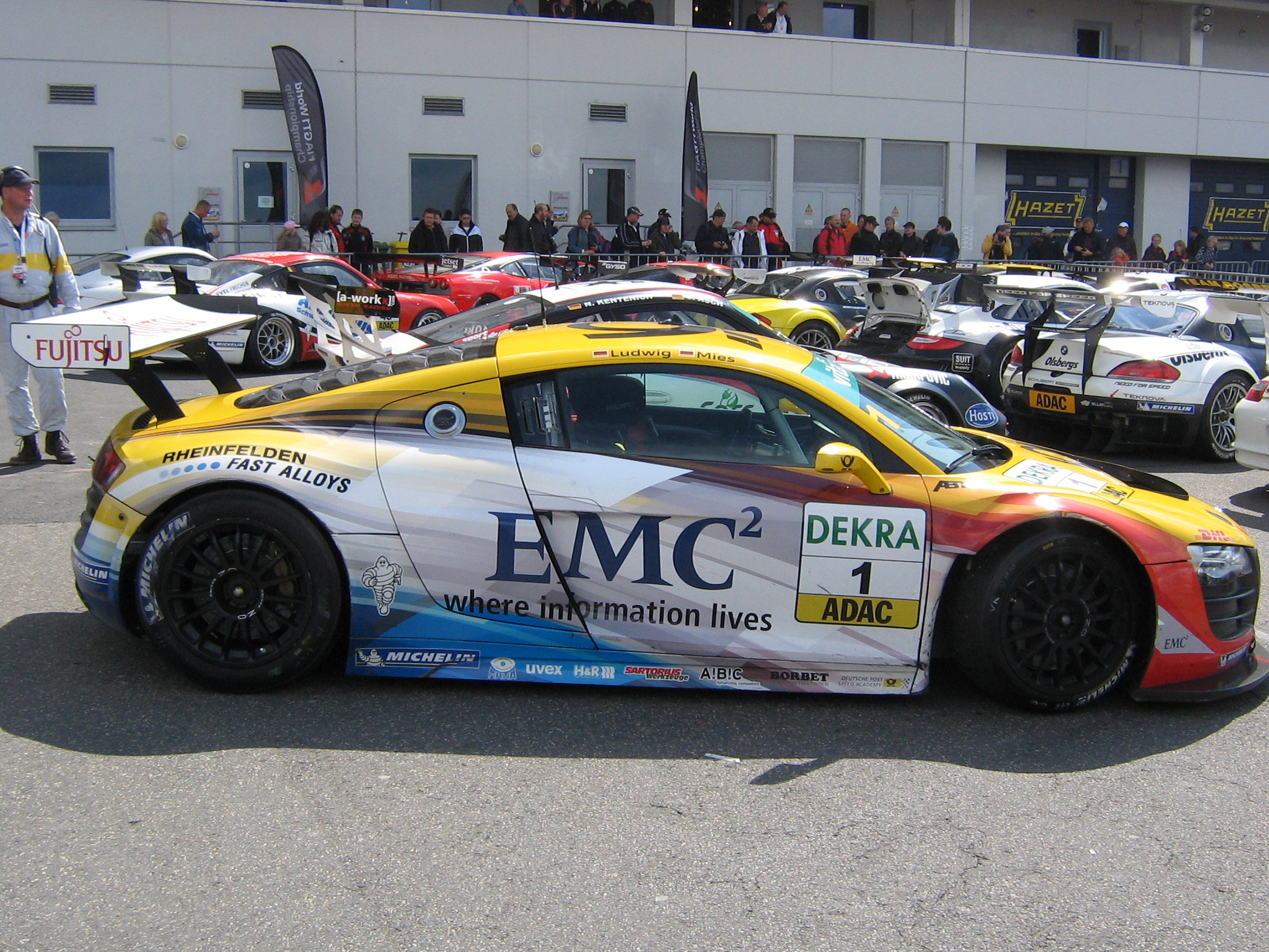 Abt Audi R8 Nr.1 ADAC GT MASTERS